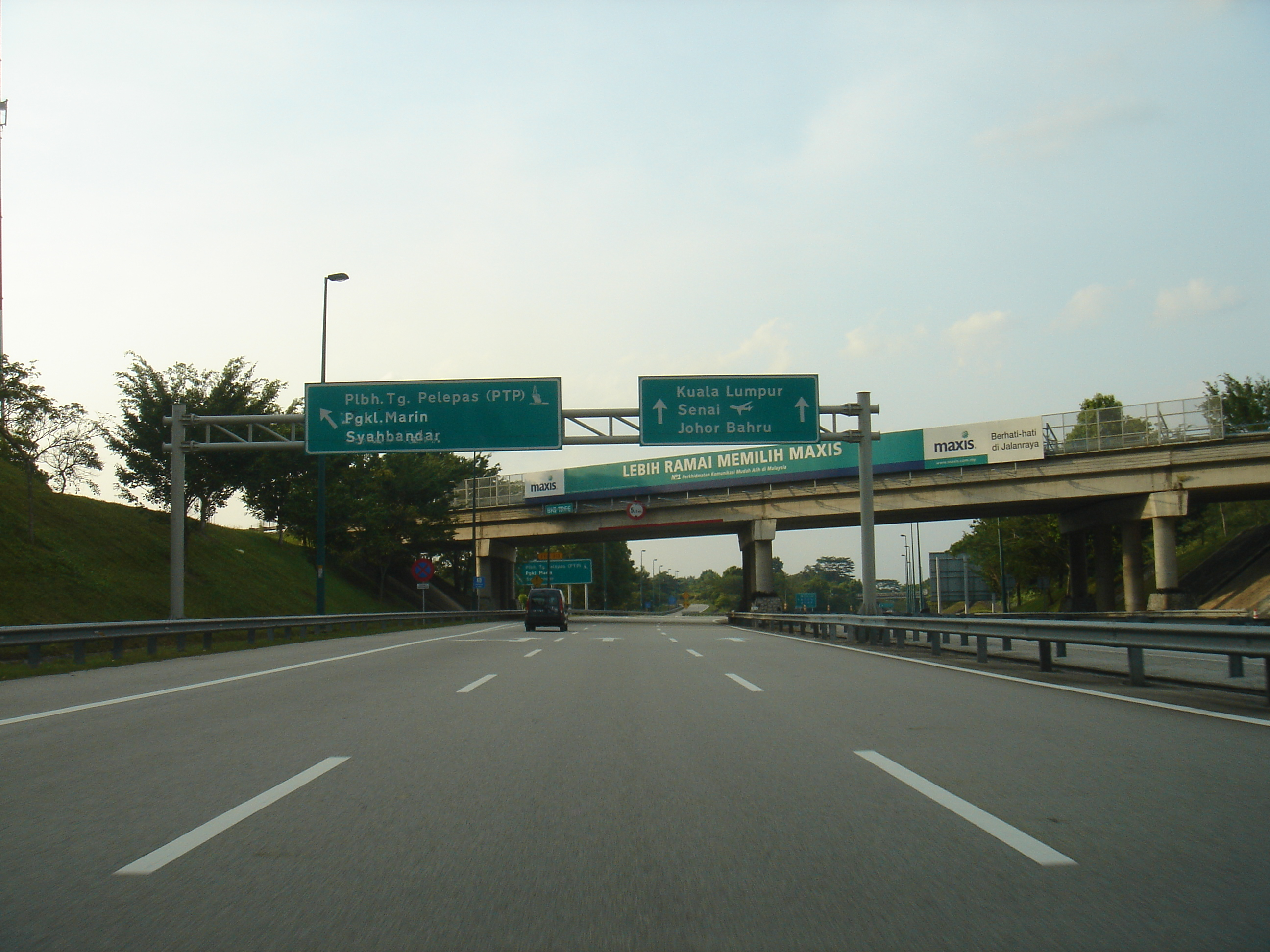 Linkedua Expressway después de la Second Link Bridge, Johor, Malasia.